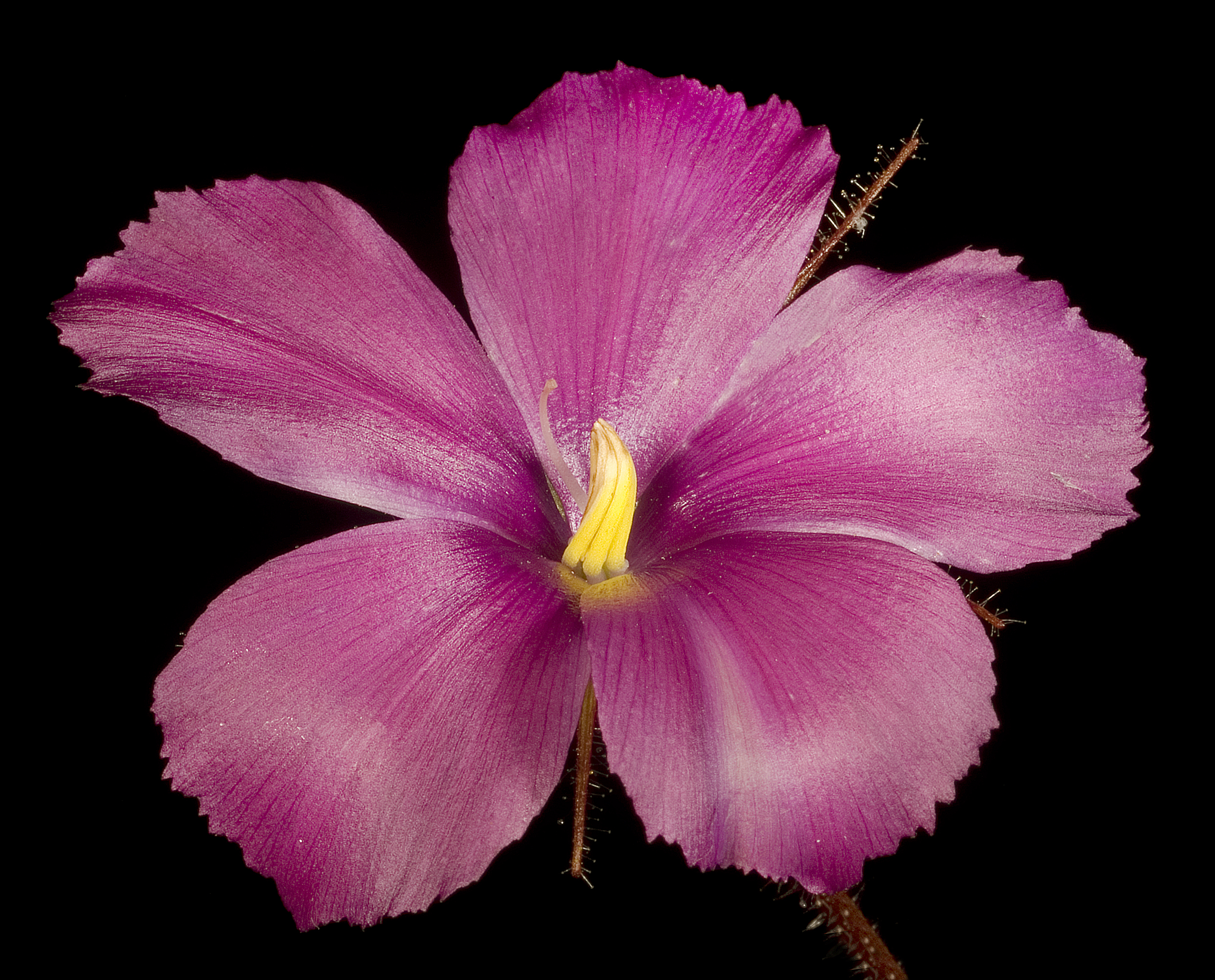 F Hort 2432